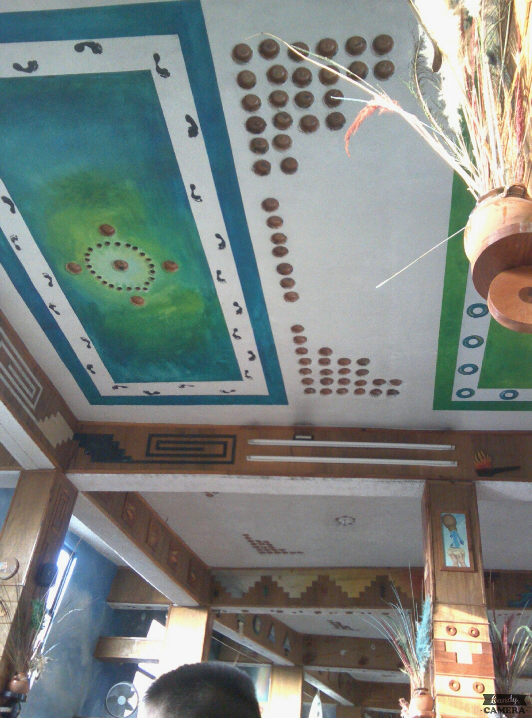 Su elaboracion lllevo varios mese, debido a que se decoró perfectamente con Ollas y pintura.